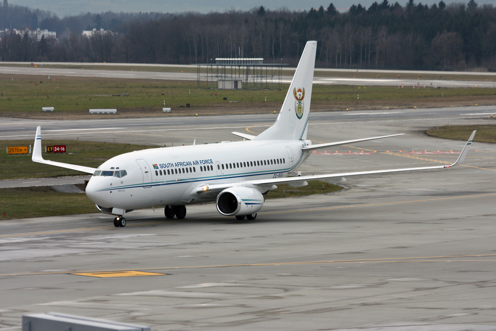 Zürich (- Kloten) (ZRH / LSZH) Switzerland 1.2012 WEF Visitor